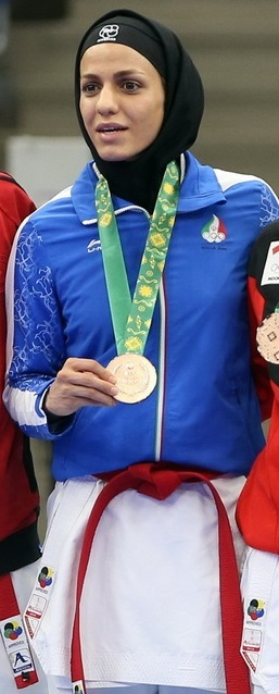 طراوت خاکسار در مسابقات کاراته بازی‌های کشورهای اسلامی2017/باکو